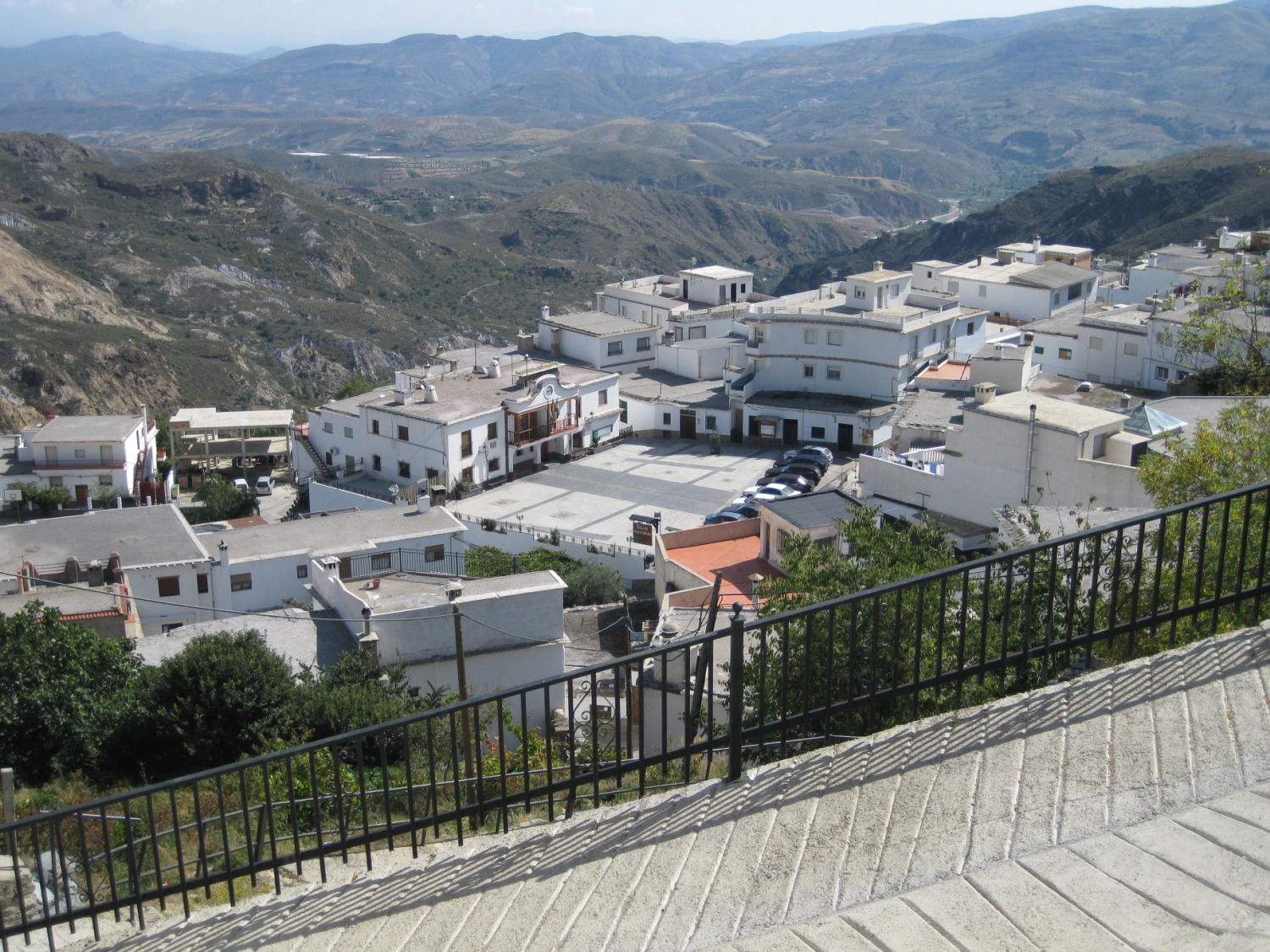 Mecina Bombarón